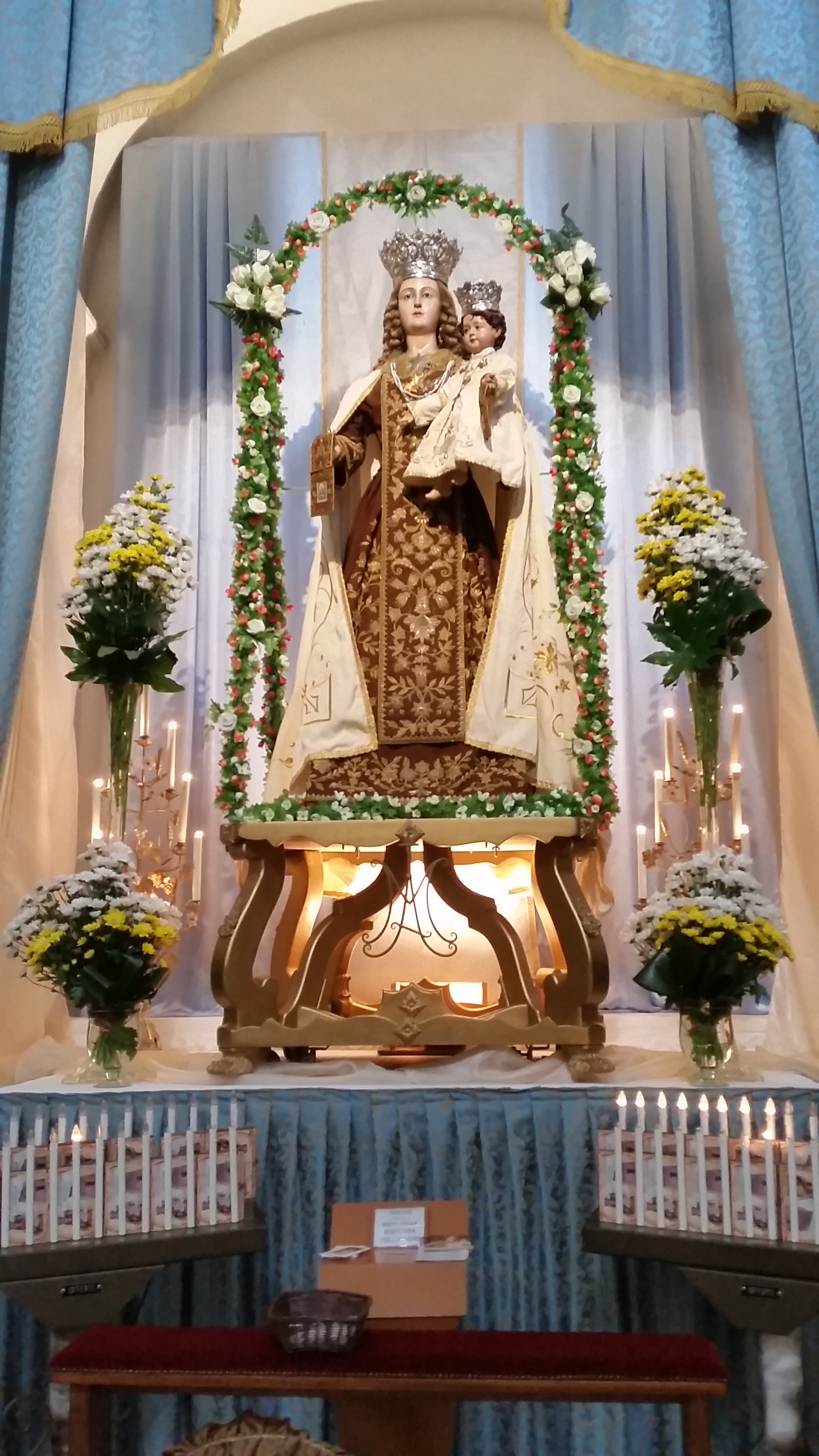 Statua della Madonna del Carmine in Carovigno(BR)